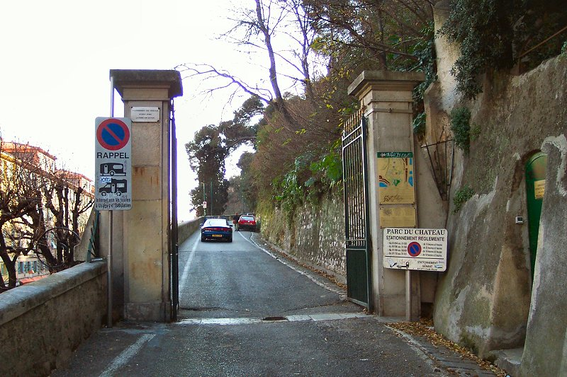 La Montée Eberlé vers le chateau.